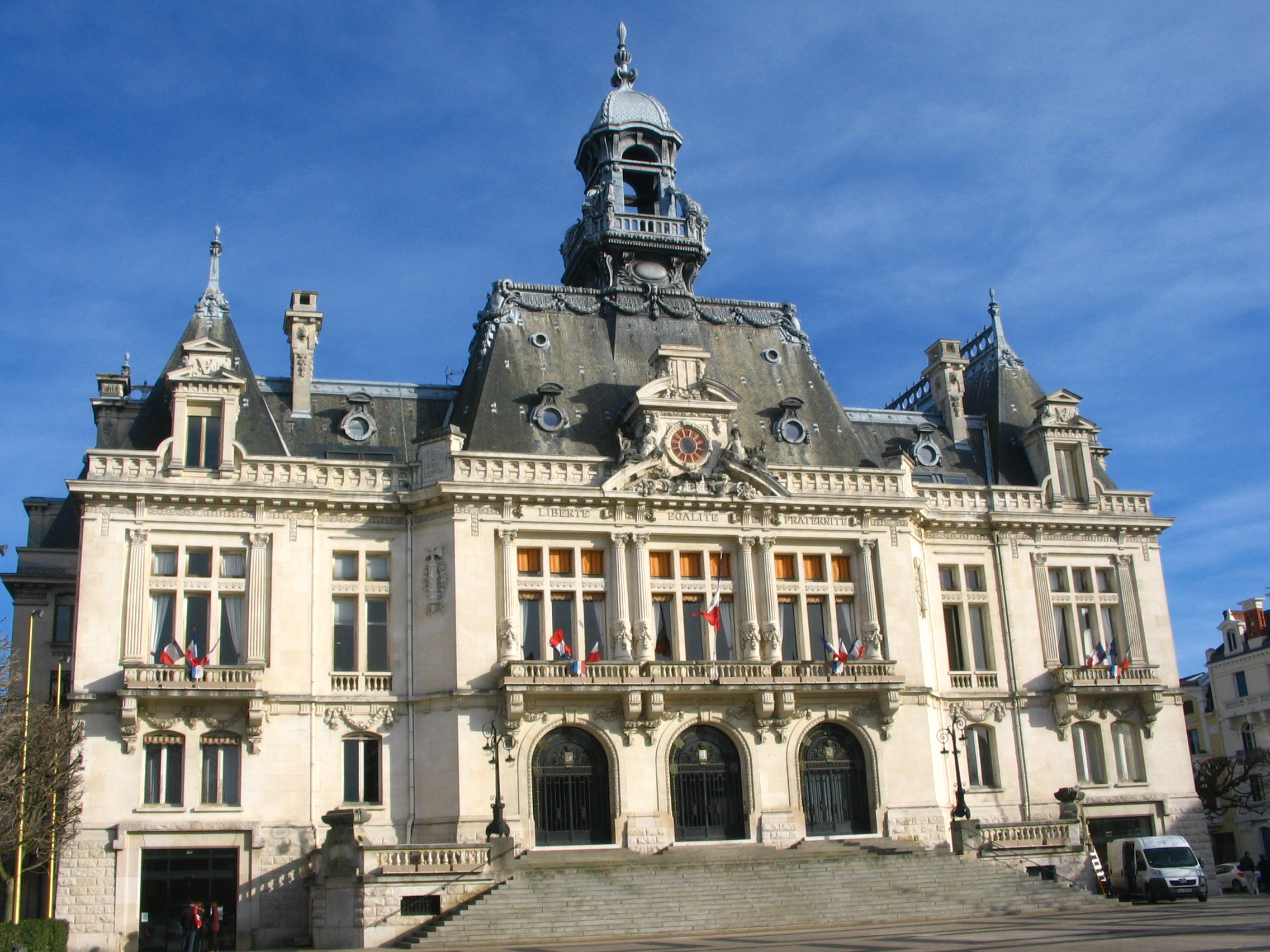 Entrée principale, façade ouest.